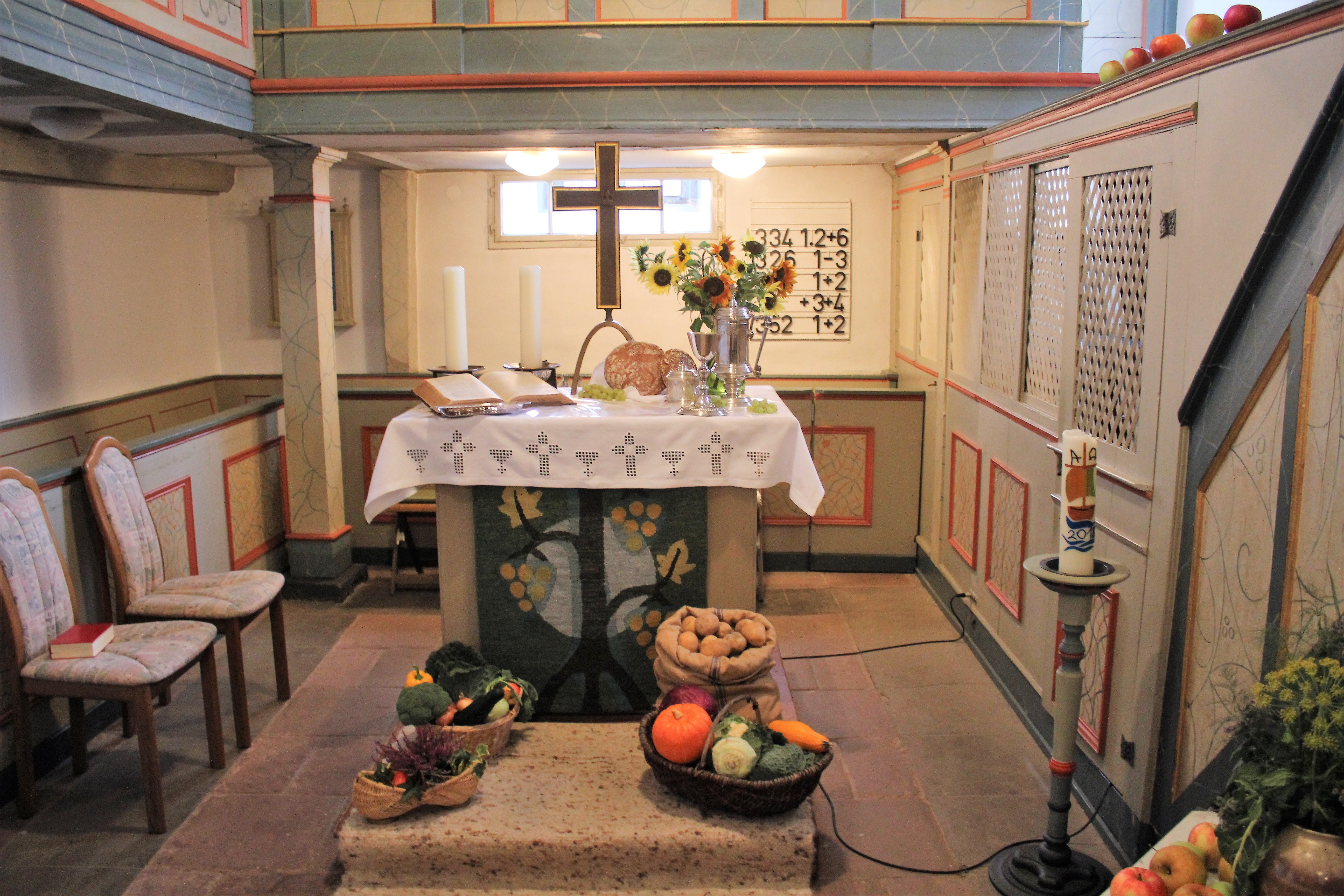 Evangelische Kirche Blasbach, Wetzlar, Lahndillkreis, Hessen, Deutschland